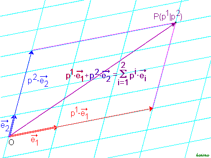 Beispiel für 2-dimensionale affine Koordinaten